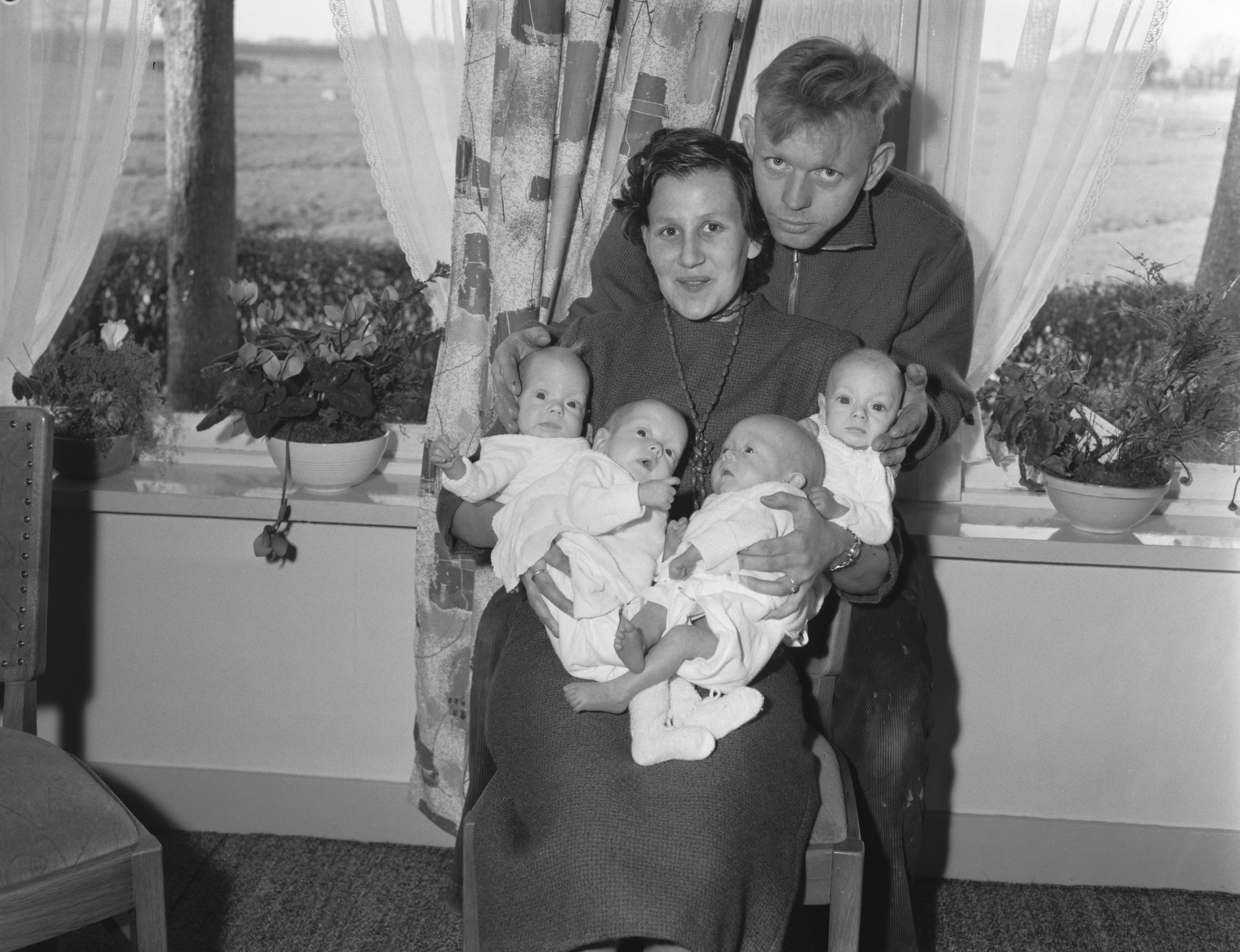 Collectie / Archief : Fotocollectie Anefo Reportage / Serie : [ onbekend ] Beschrijving : Friese vierling Lautenbach herenigd in de ouderlijke woning te Deinum Datum : 25 januari 1959 Locatie : Deinum Trefwoorden : vierlingen Fotograaf : Rossem, Wim van / Anefo Auteursrechthebbende : Nationaal Archief Materiaalsoort : Negatief (zwart/wit) Nummer archiefinventaris : bekijk toegang 2.24.01.04 Bestanddeelnummer : 910-1187